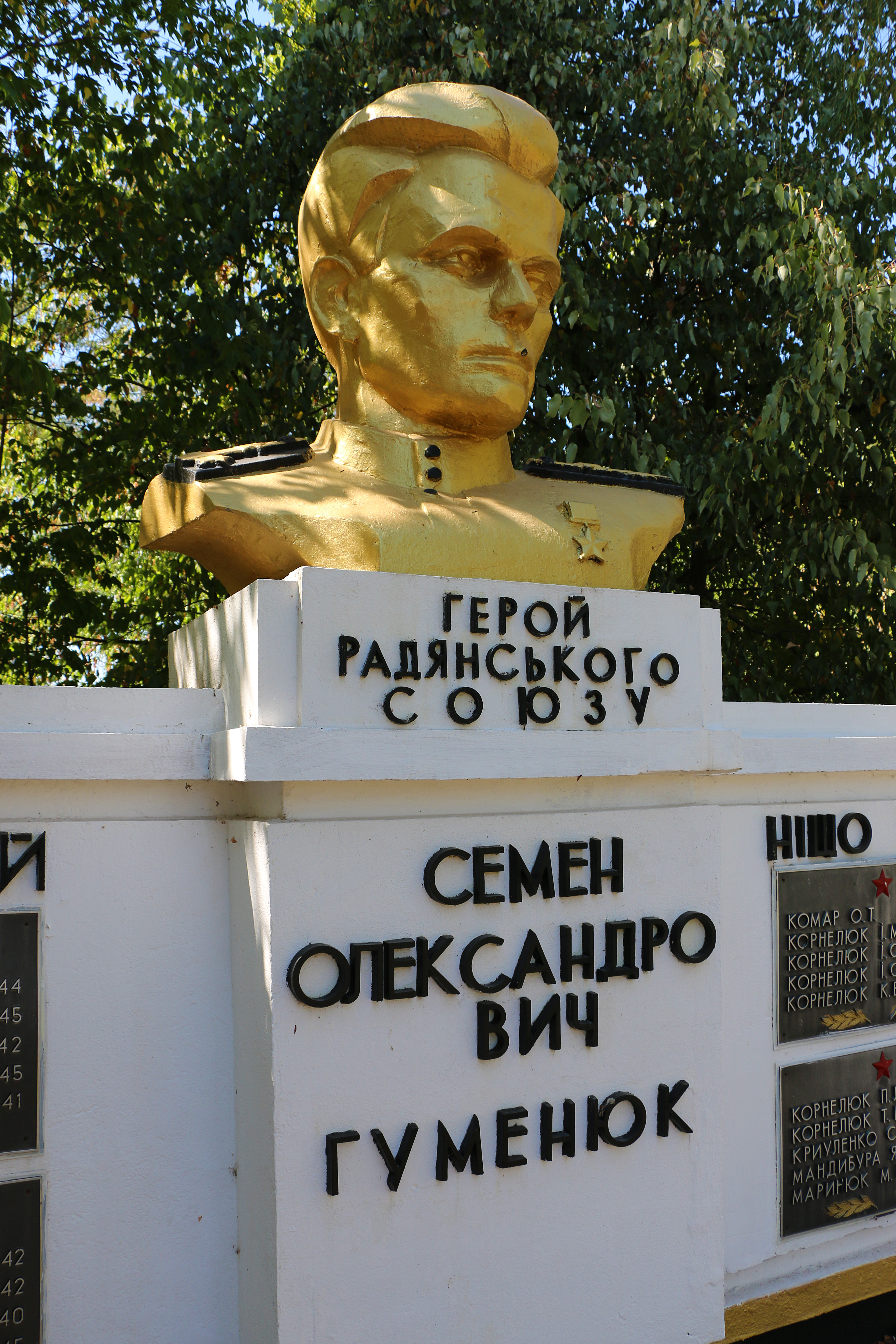 Пам'ятник Герою Радянського Союзу С. О. Гуменюку, Слобода-Дашковецька, вул. Гуменюка